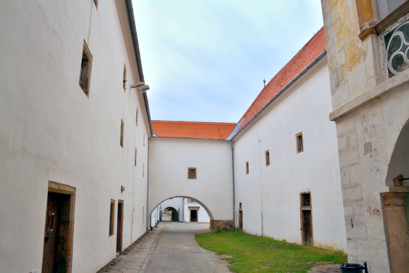 klášter Oslavany